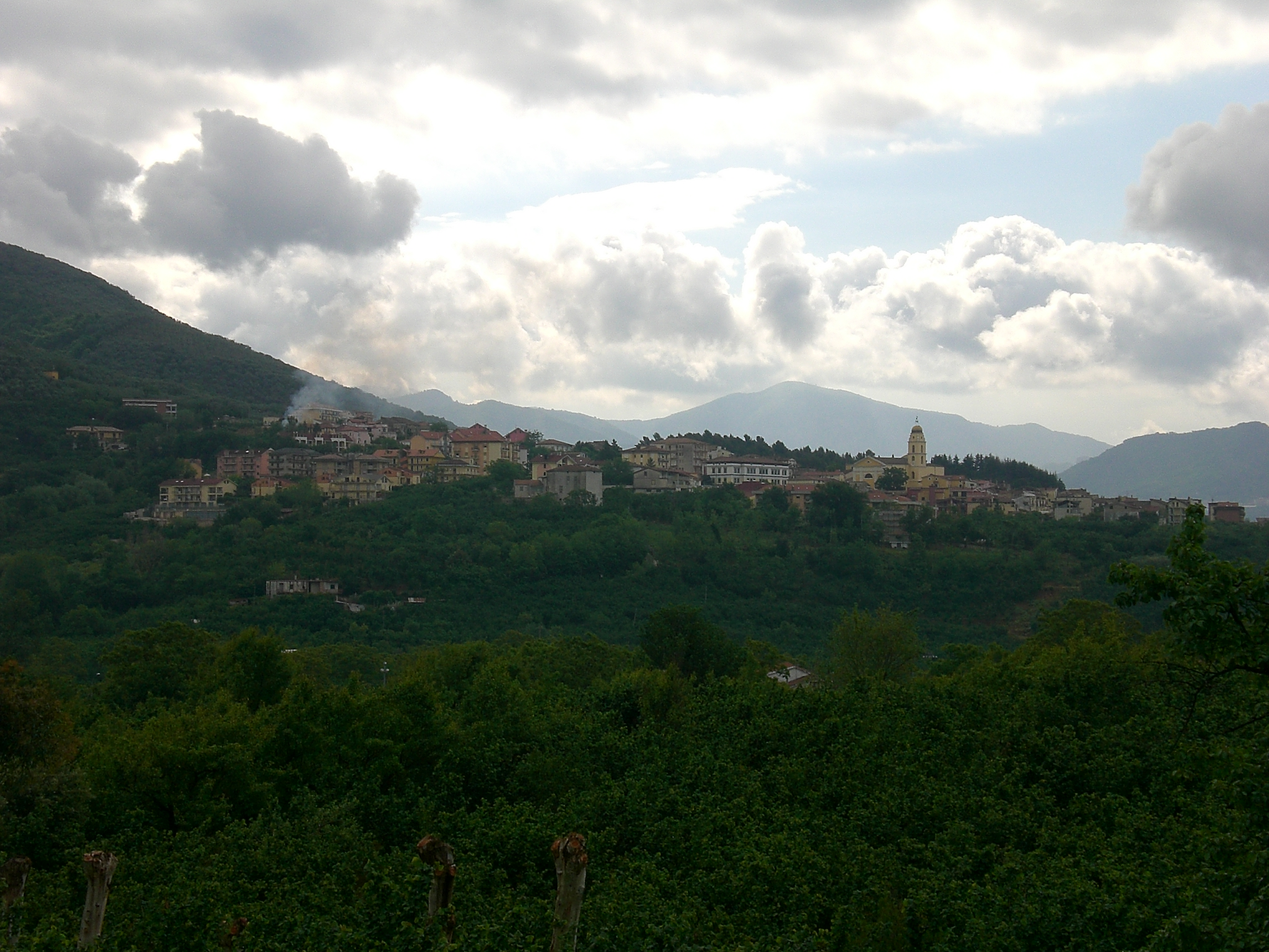 Panorama di Capitignano, casale capoluogo di Giffoni Sei Casali